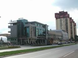 Liman 4